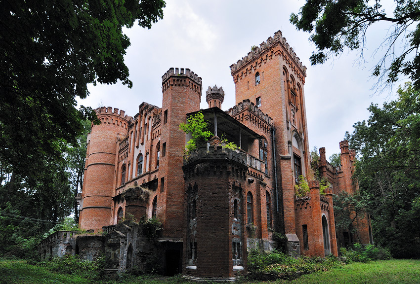 Палац Даховських у Леськовому Черкащина